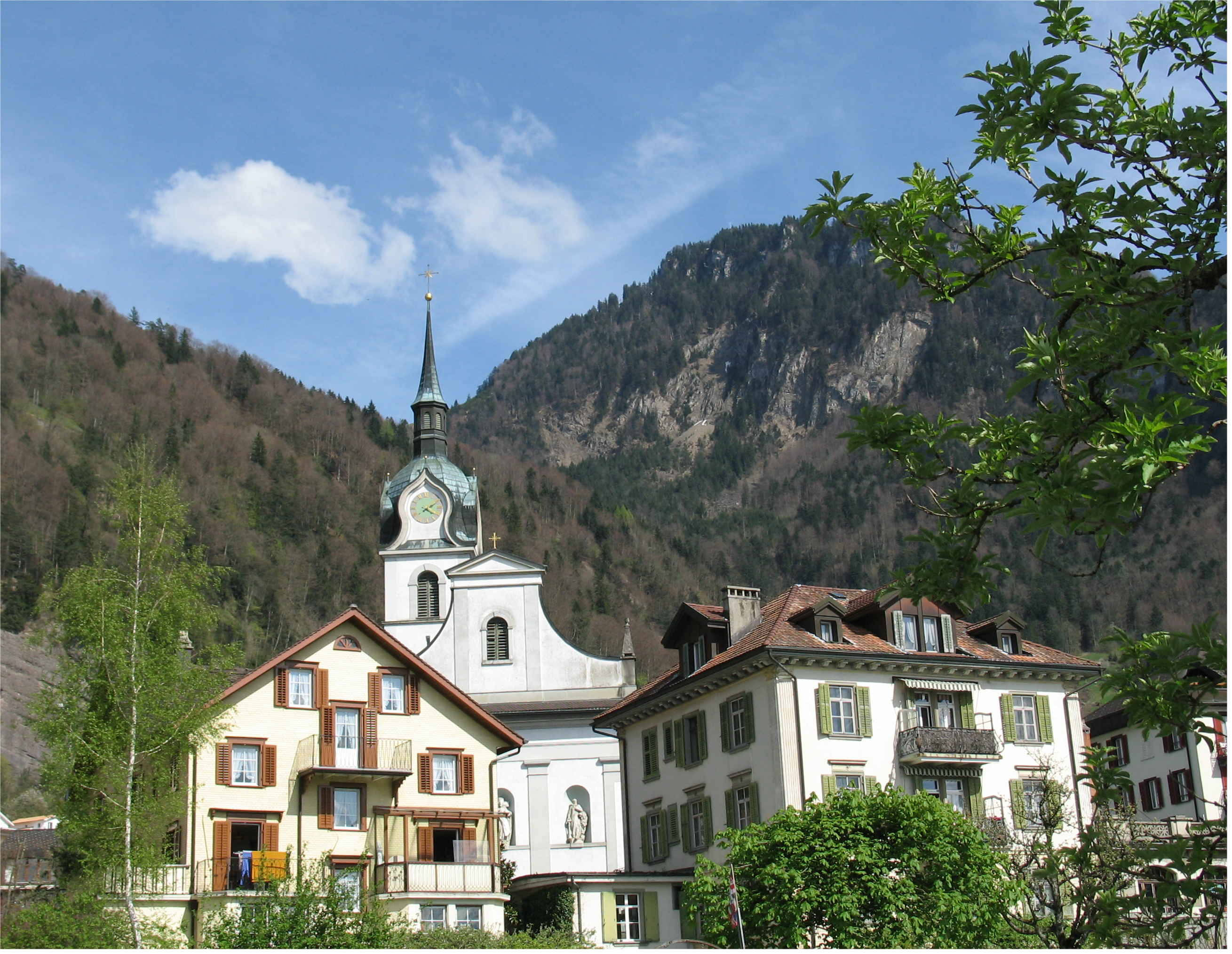 Vitznau.